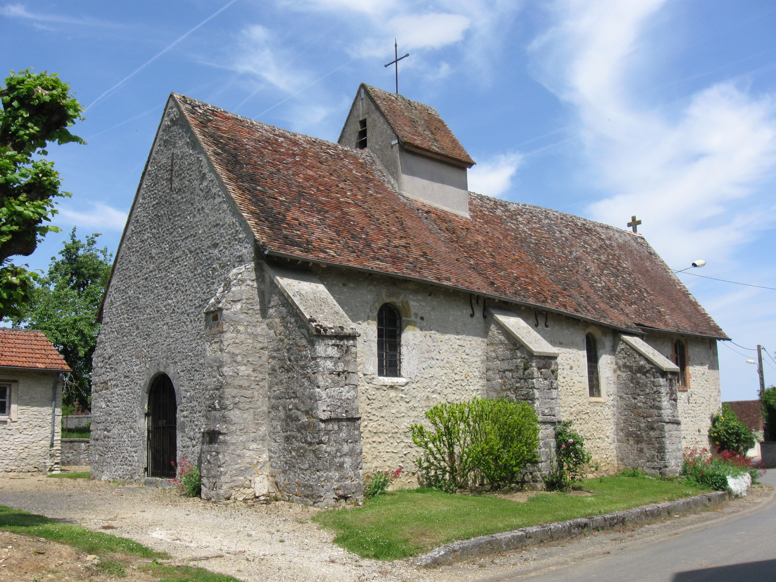 Église Saint-Sulpice de La Chapelle-Saint-Sulpice. (Seine-et-Marne, région Île-de-France).